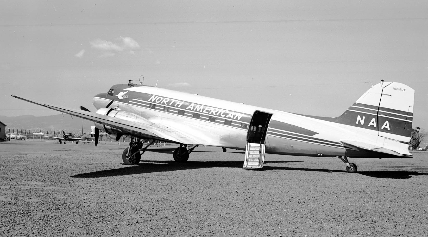 N55297 at Oakland, CA, in May 1955.